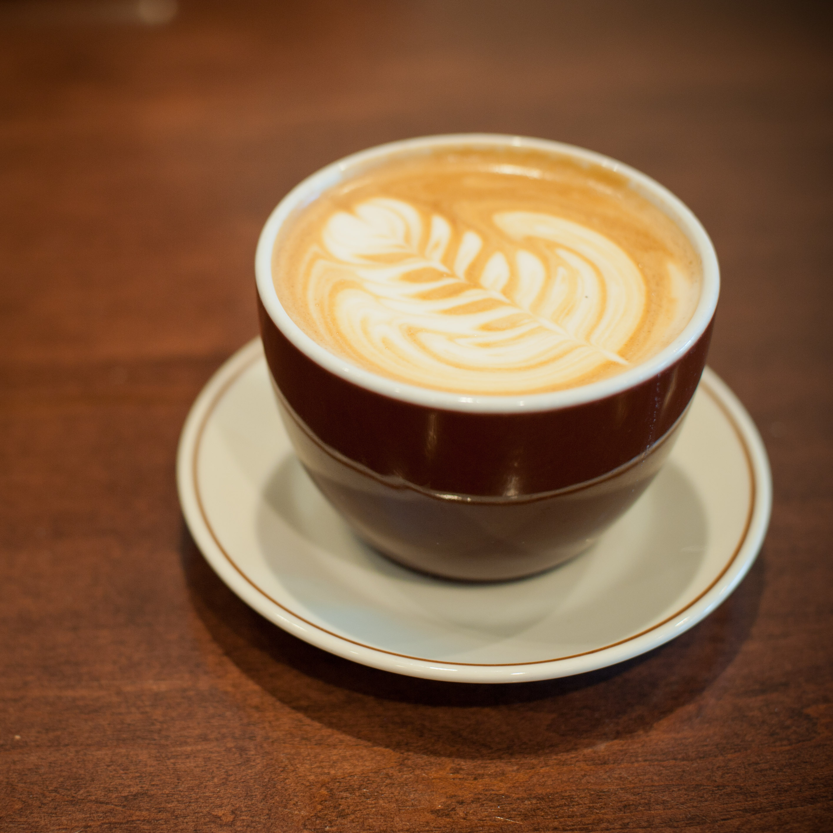 Elysian, Latte